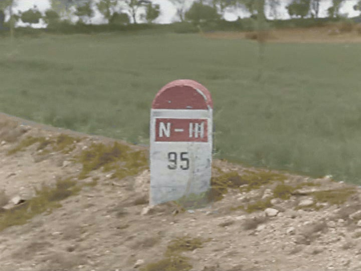 Mojón del kilómetro 95 de la Carretera Nacional III en 1973 a su paso por la localidad conquense de Villarrubio. Concretamente en este punto tuvo lugar el fatal accidente del cantante Nino Bravo.